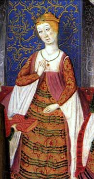 Imagen de Isabel de Castilla en el Rimado de la Conquista de Granada.